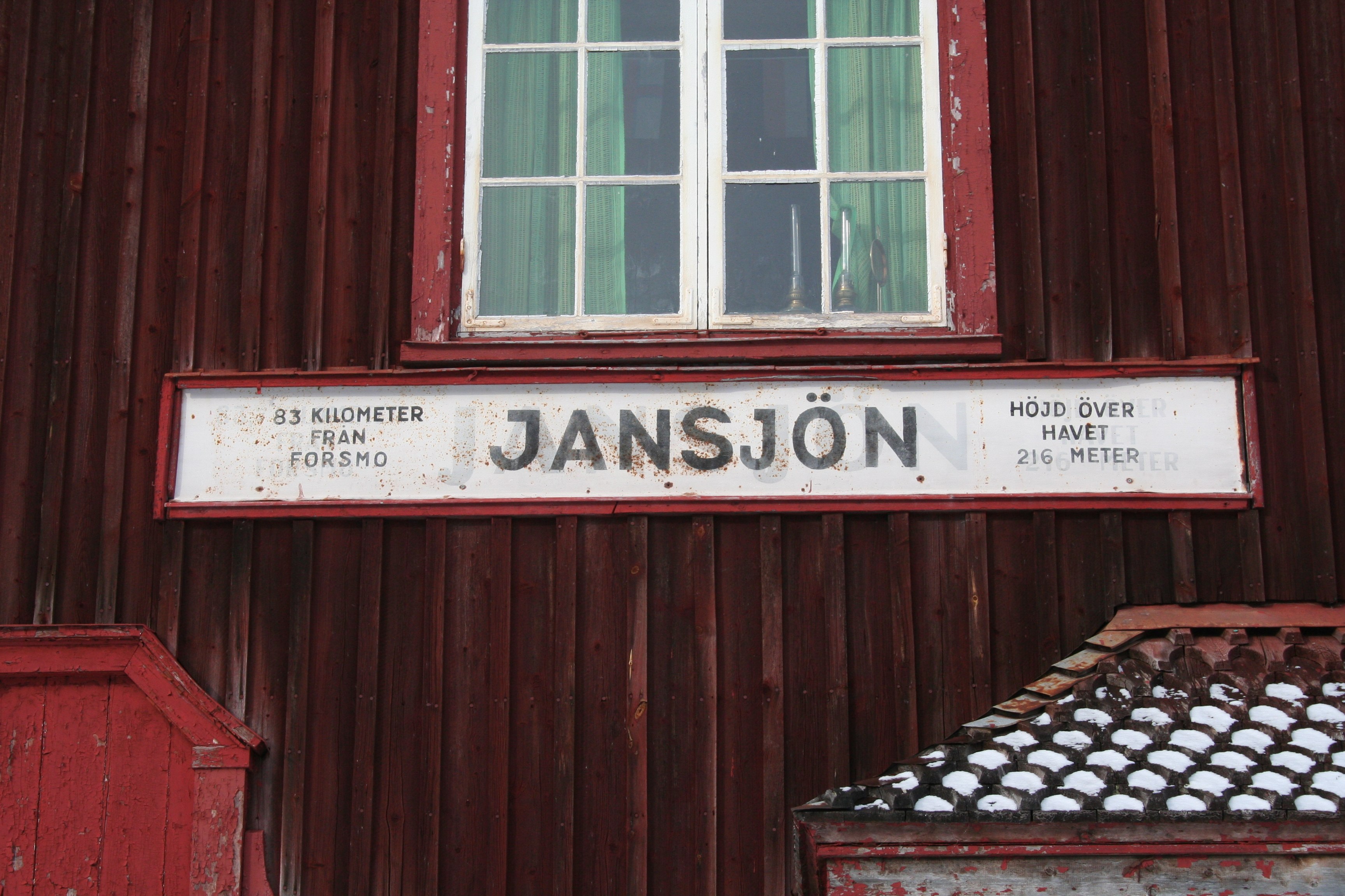 Järnvägsstation efter Hoting-Forsmo Banan